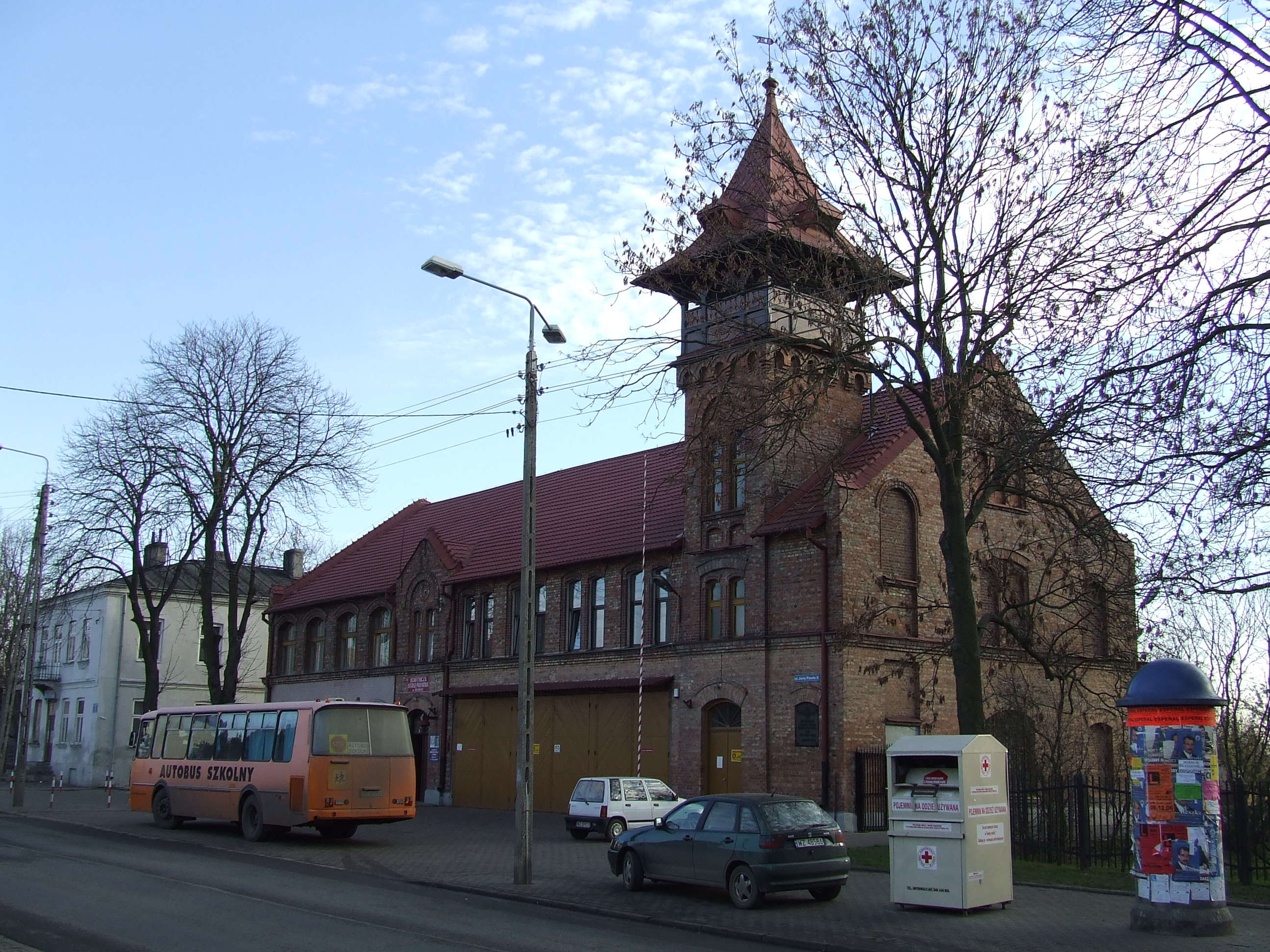 Błonie, Remiza strażacka z 1905